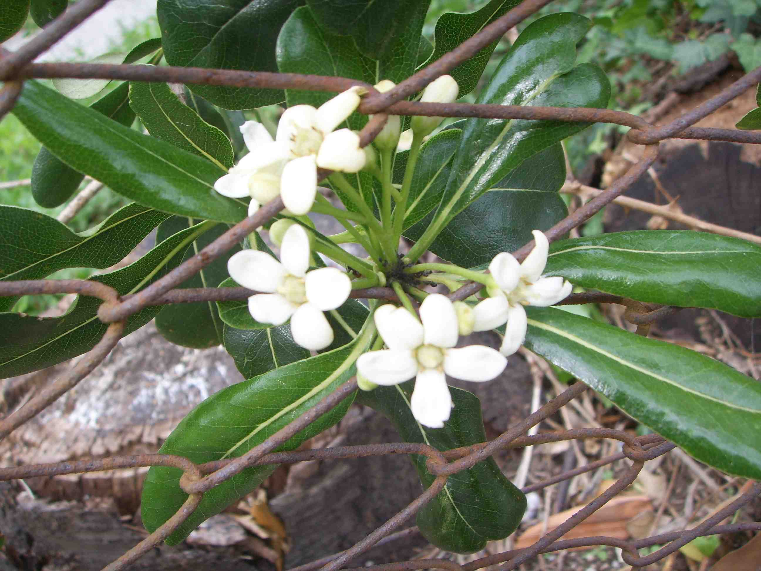 Fiori di pittosporo - "Foto scattata da me (Pepp.cristiano 18:21, 20 mag 2006 (CEST), Giuseppe Cristiano), la rilascio nel pubblico dominio